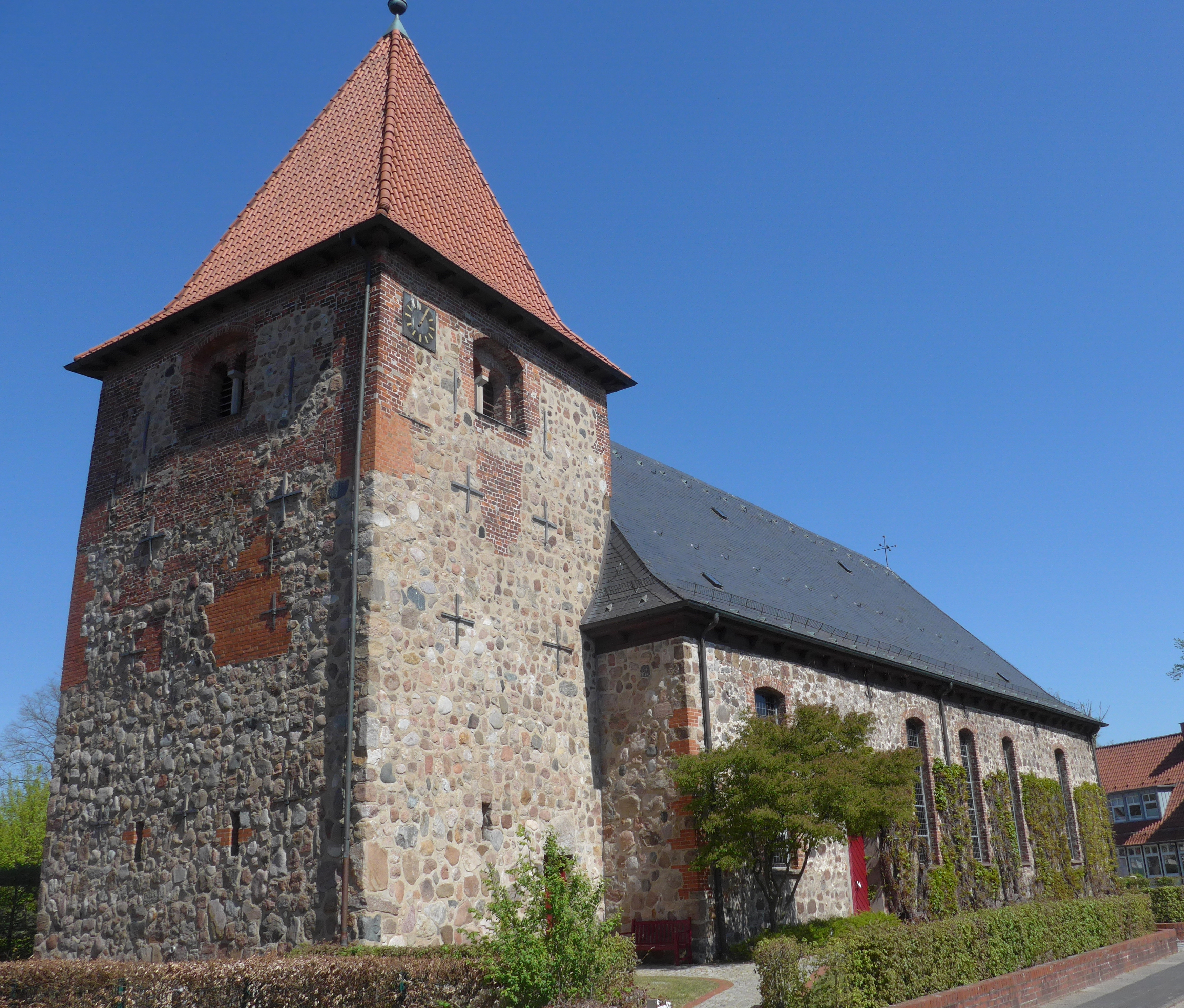 Kirche St. Georg in Sottrum von Südwesten